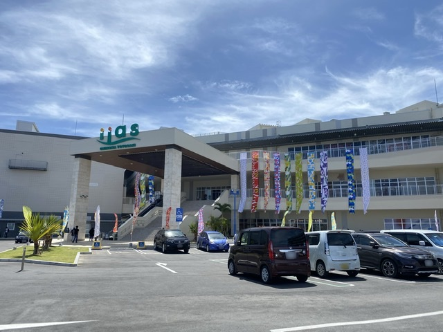 正面大階段前より撮影